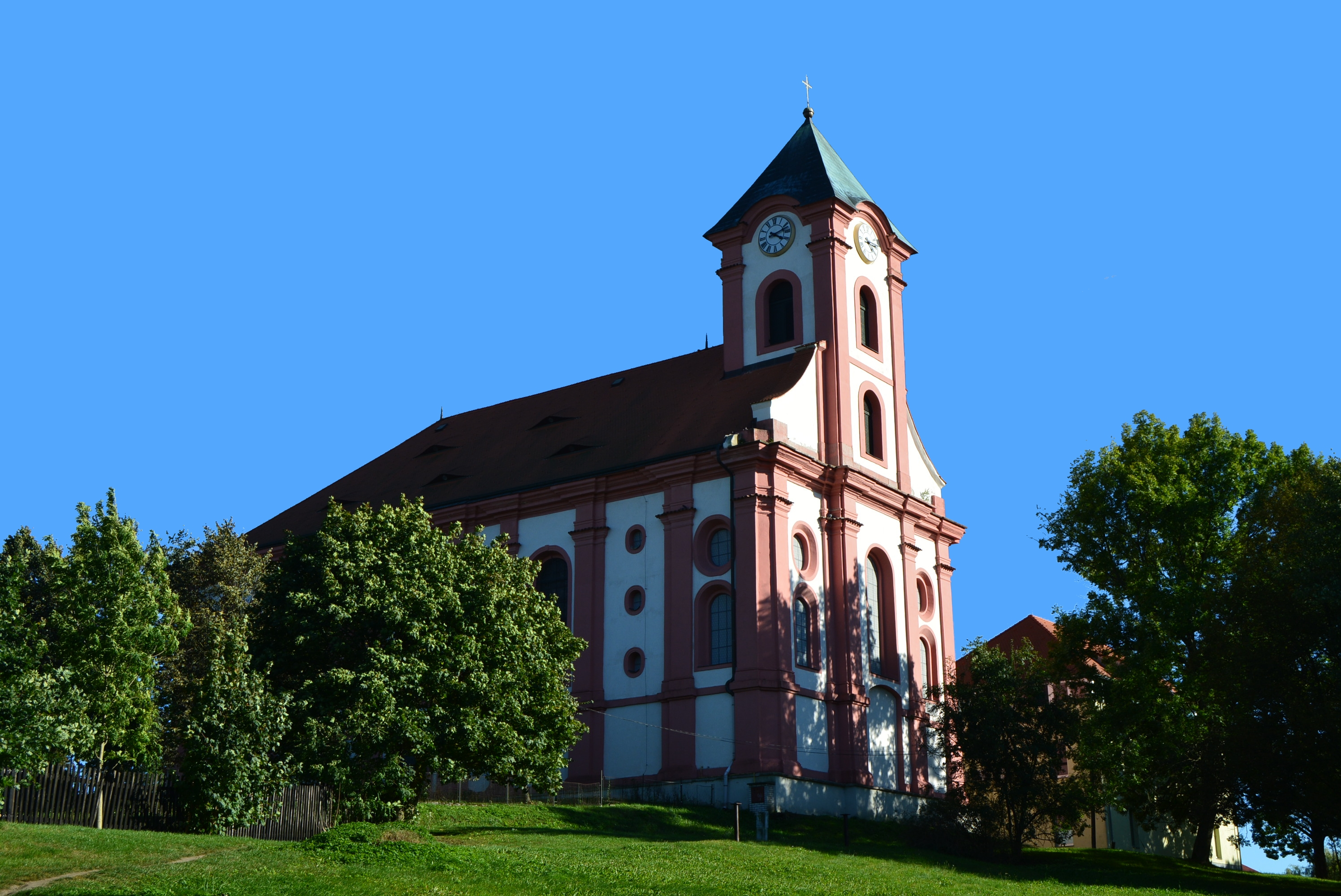 Pohled na kostel sv. Vavřince ze severozápadní strany.